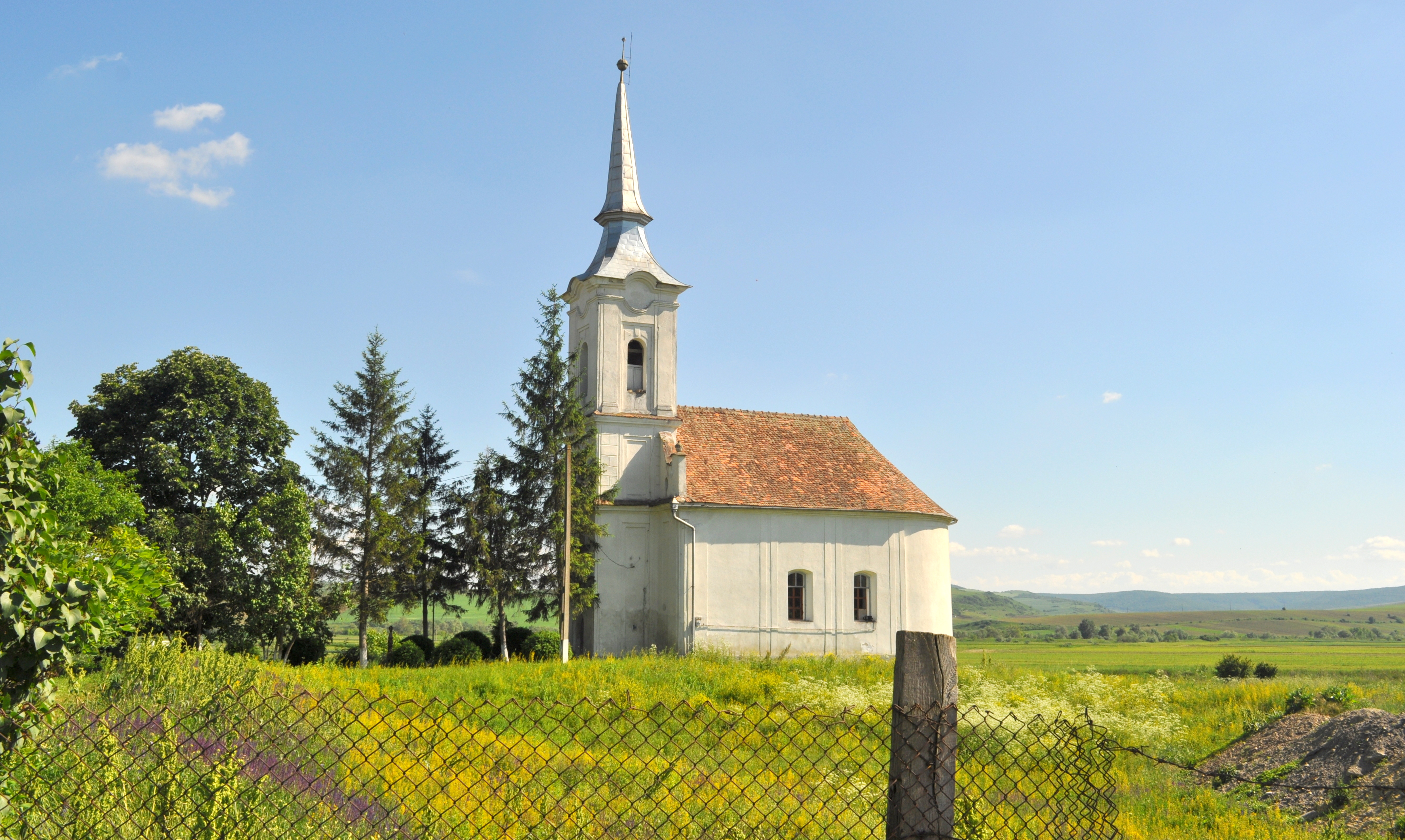 Biserica reformată, sat Sânmiclăuș; comuna Șona